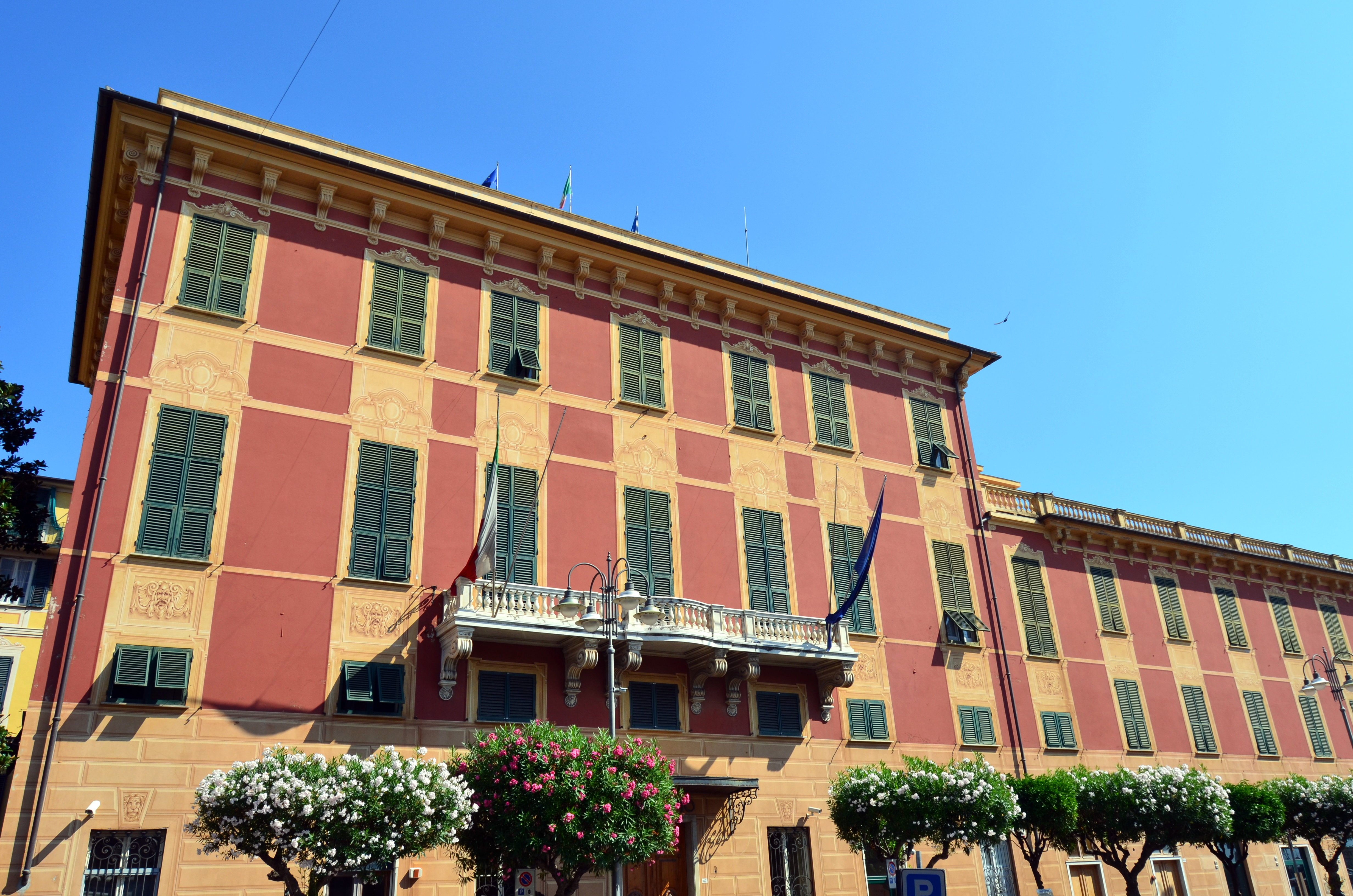 Palazzo Franzoni, sede del municipio di Lavagna, Liguria, Italia